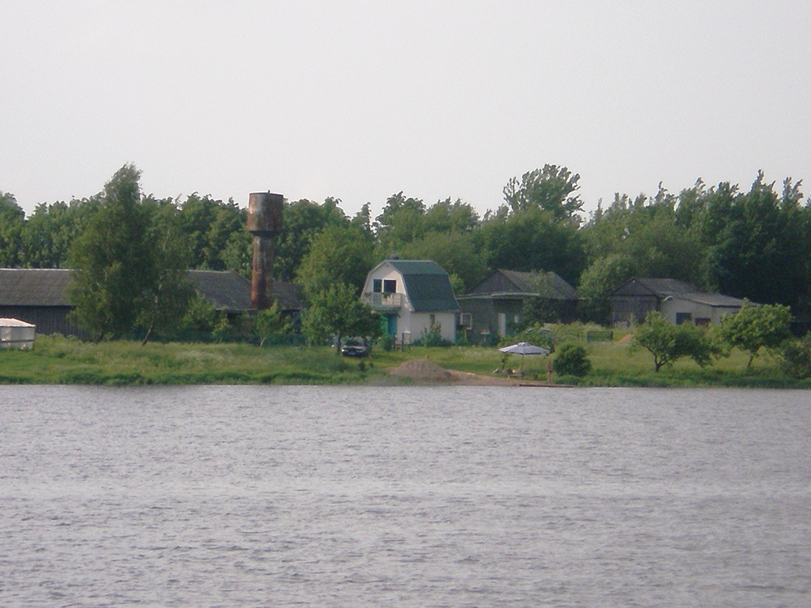 Koliupė nuo Juodkiškių tvenkinio